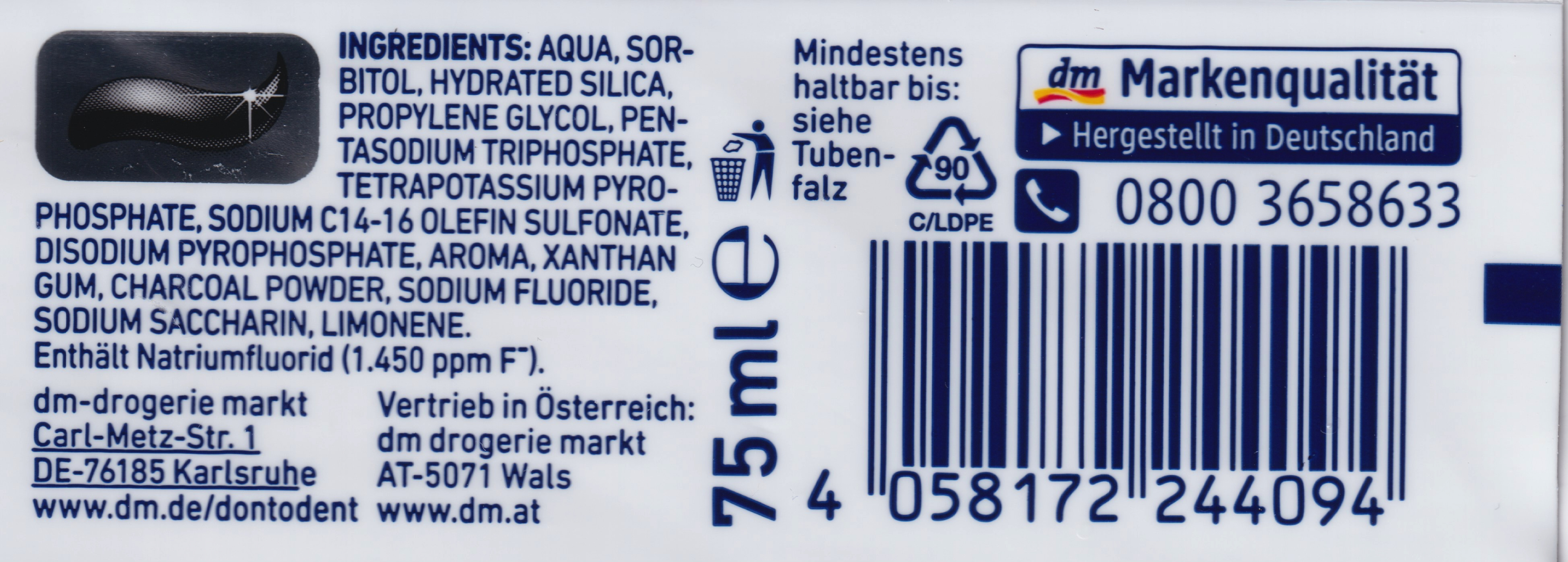 Rückseite einer Zahnpasta-Tube mit (a) INCI-konformer Angabe der Inhaltsstoffe (b) Füllmengenangabe laut Fertigpackungsverordnung (c) Name und Anschrift des Inverkehrbringers (d) Verweis auf das im Tubenfalz eingeprägte MHD (Mindesthaltbarkeitsdatum) (e) EAN-Code (f) Angabe des Herstellungslands Deutschland (g) Angabe des Natriumfluorid-Gehaltes